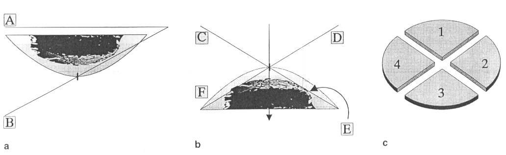 Representação esquemática do método de Mohs de cirurgia micrográfica